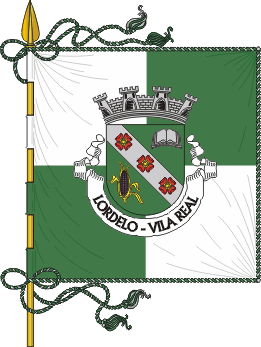 Estandarte da freguesia de Lordelo (concelho de Vila Real)